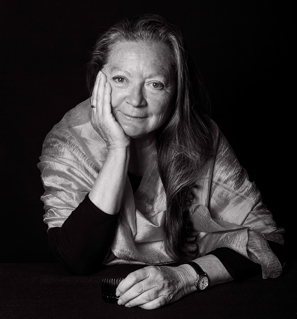 RETRATO